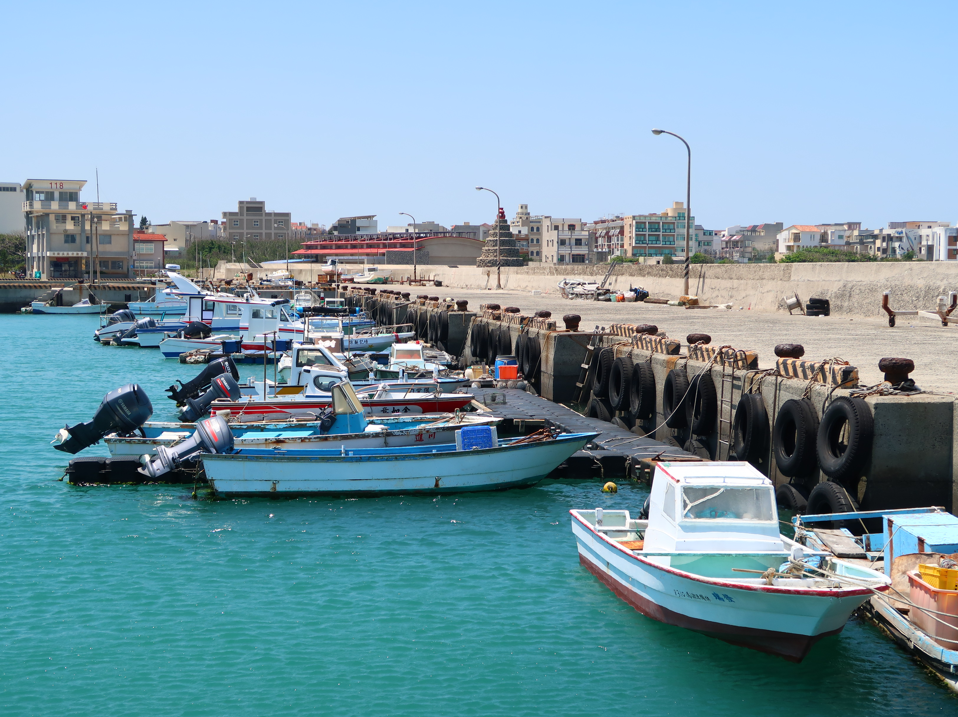 臺灣澎湖縣馬公市西衛里的漁港